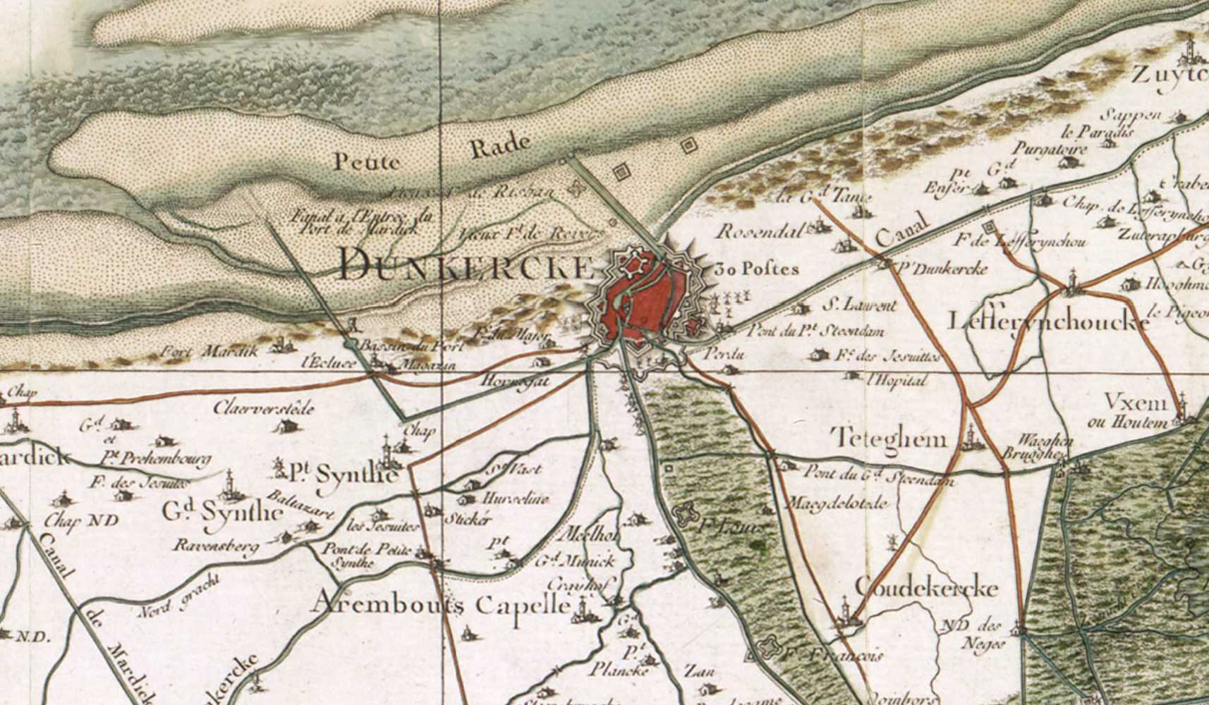 Carte de Cassini de la région de Dunkerque